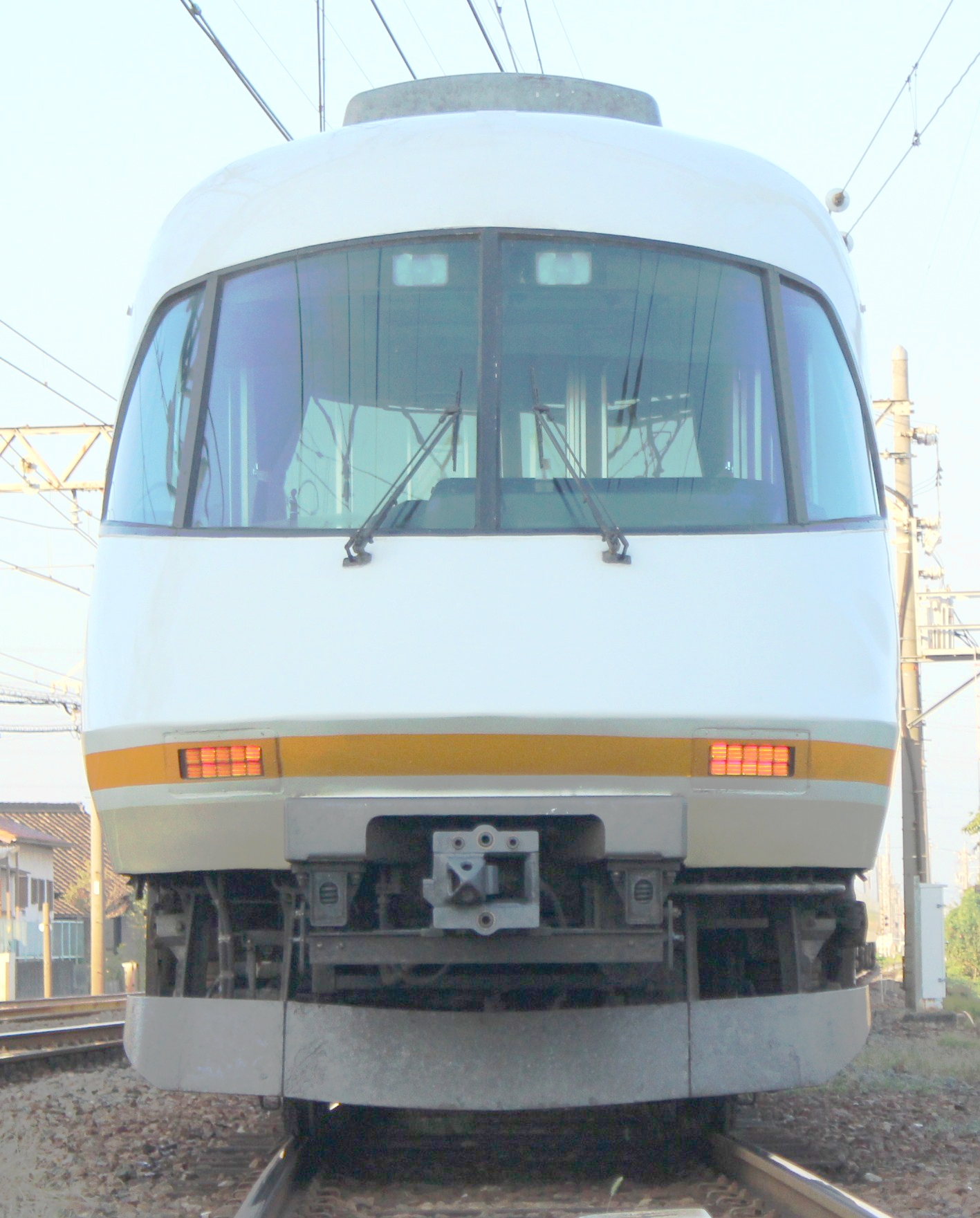 21000系リニューアル車の正面